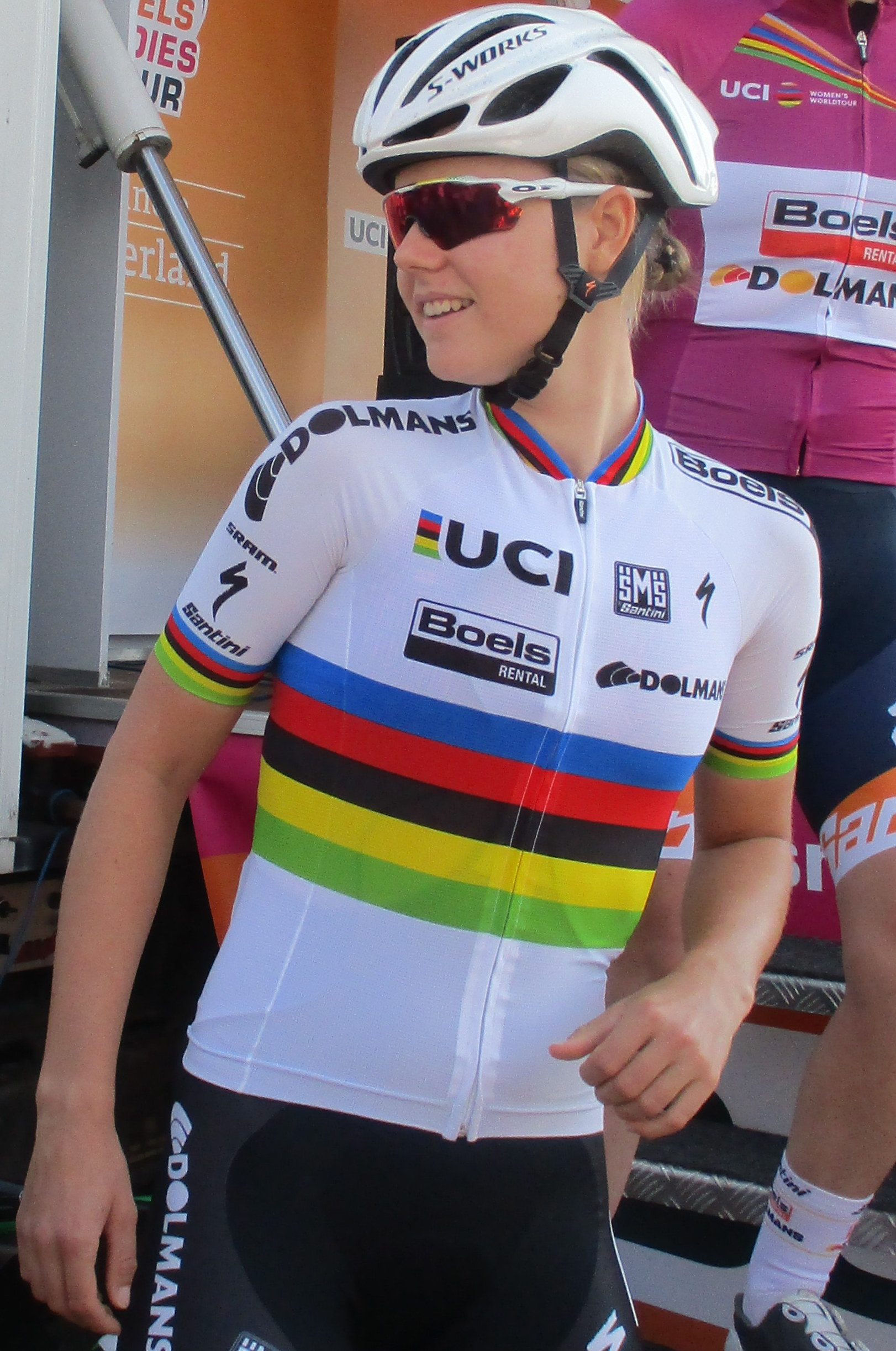 Start van de 6e etappe van de Boels Ladies Tour 2017 op het Tom Dumoulin Bike Park in Sittard-Geleen.